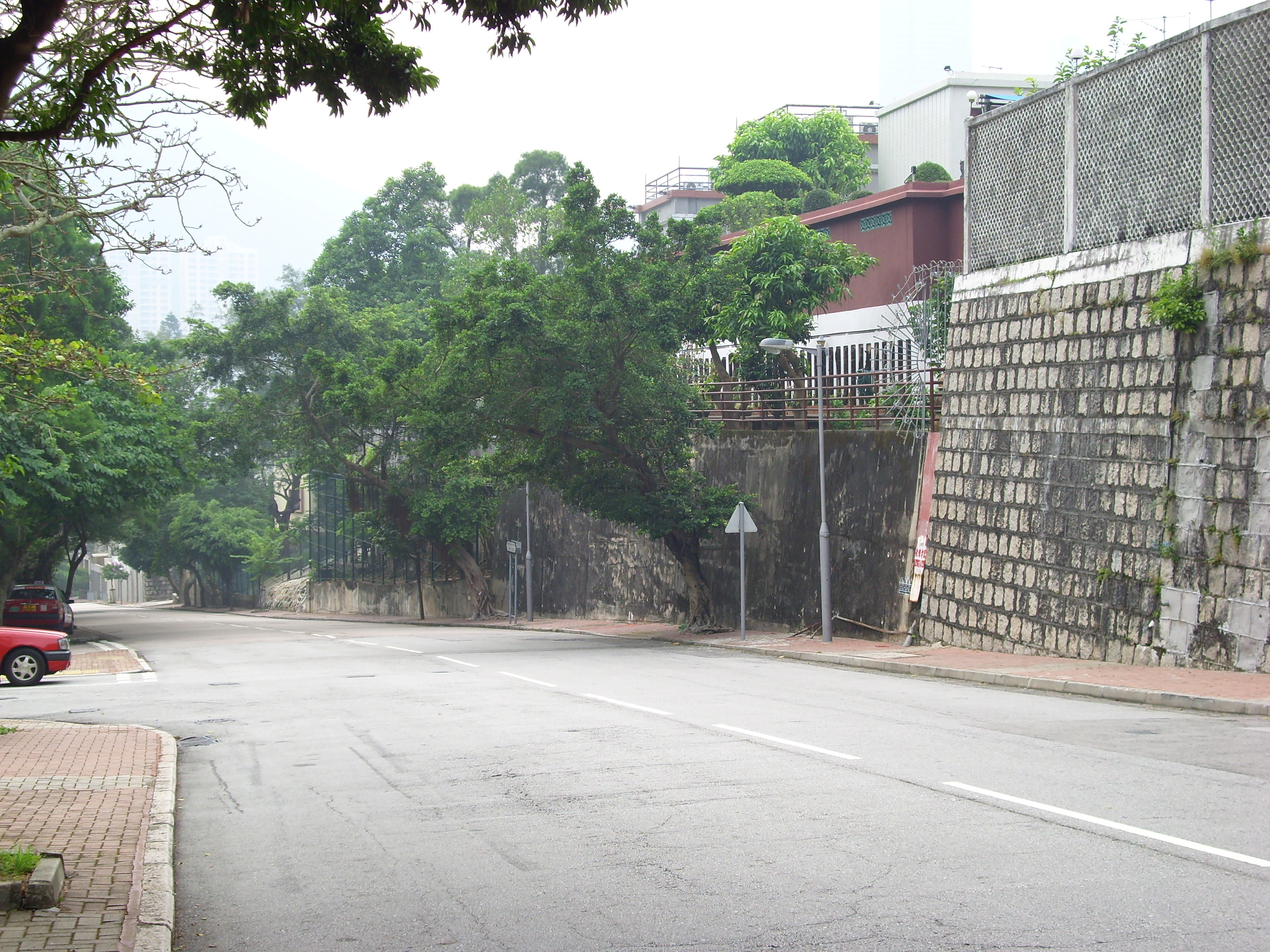 畢拉山道 MOUNT BUTLER ROAD